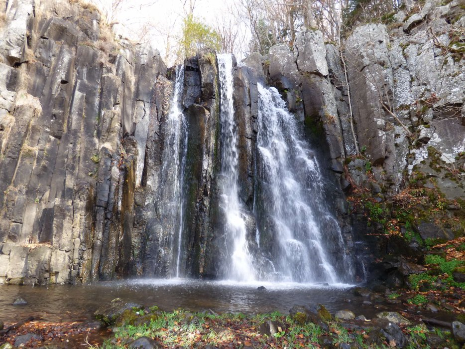 Cascade de la Terisse, Auvergne, Novembre 2015